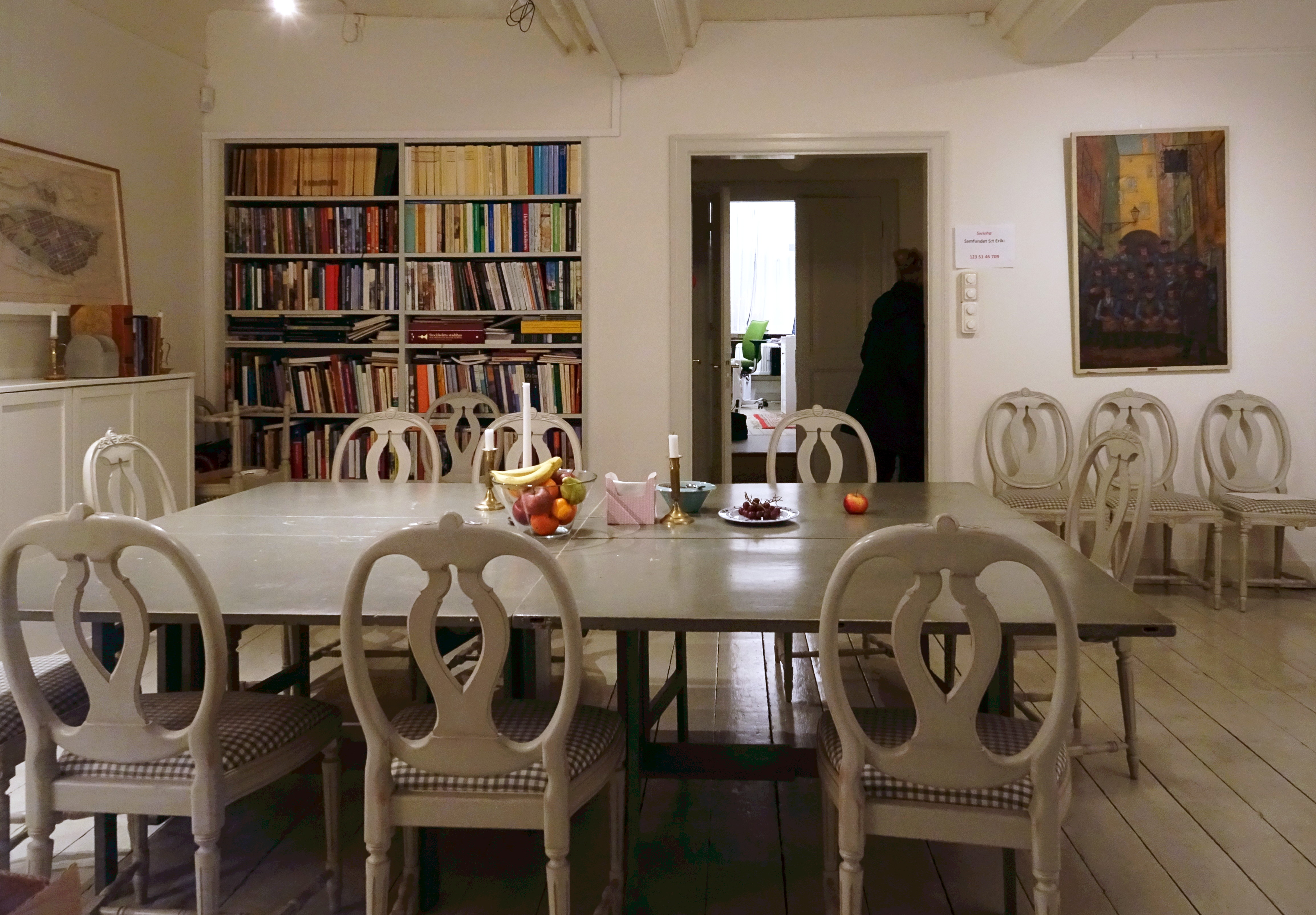 Samfundet S:t Eriks lokal på Köpmangatan 5